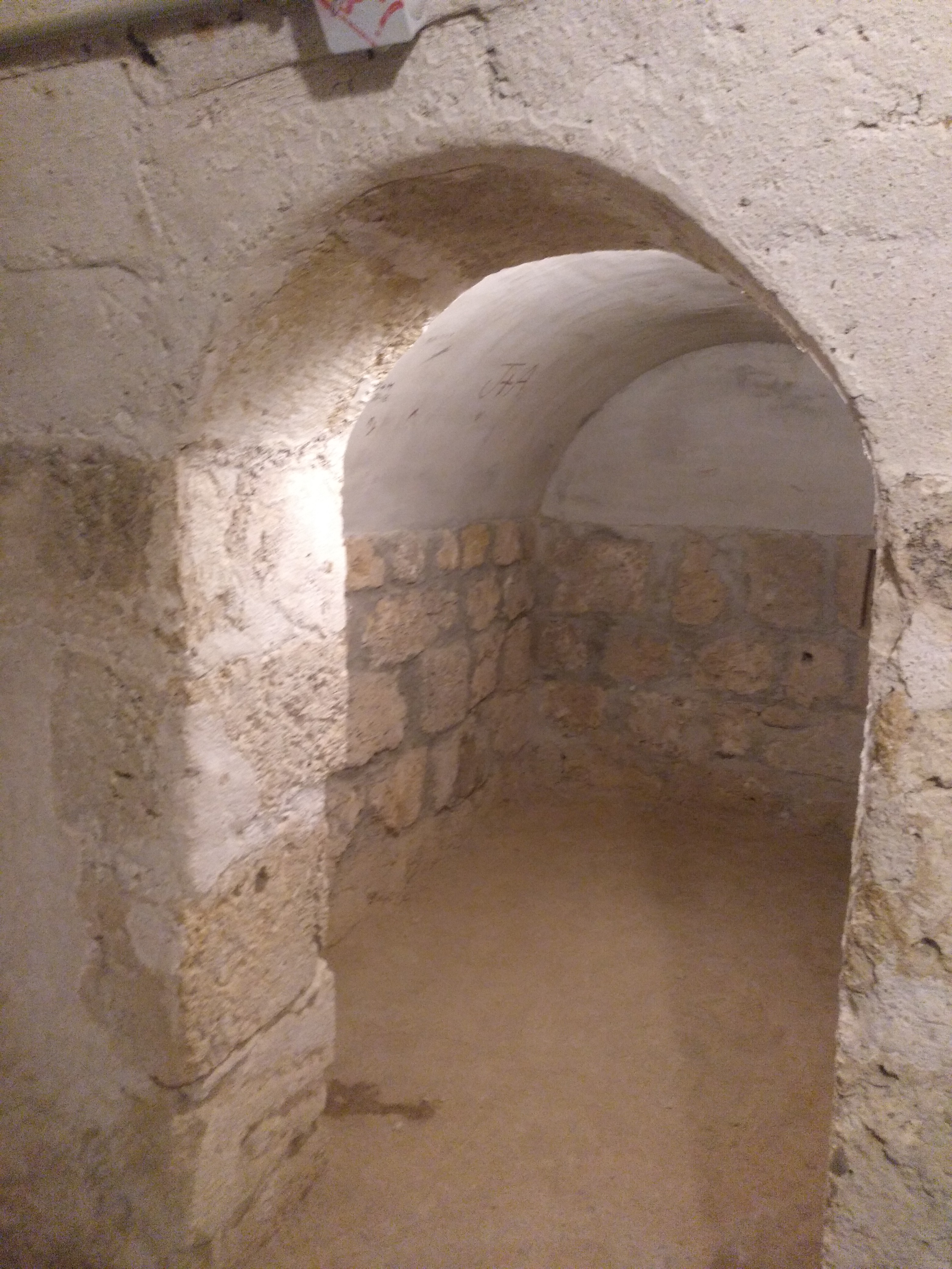 Interior de la gloria (antiguo sistema de calefacción) del Monasterio de Piedra en Calatayud, Aragón